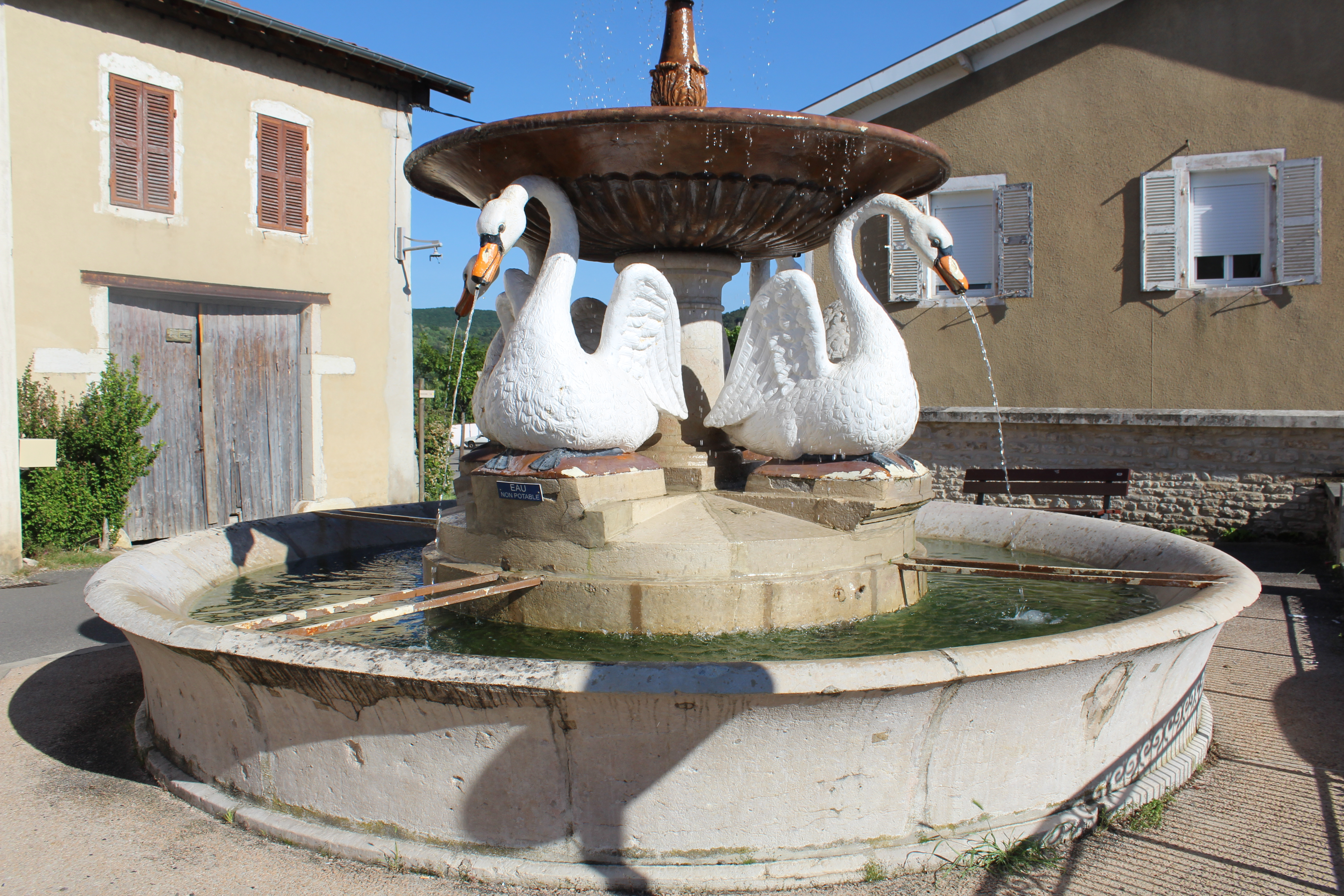 Fontaine des Cygnes de Ceyzériat.